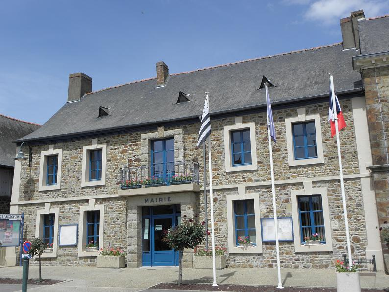 Mairie de Louvigné-de-Bais (35).